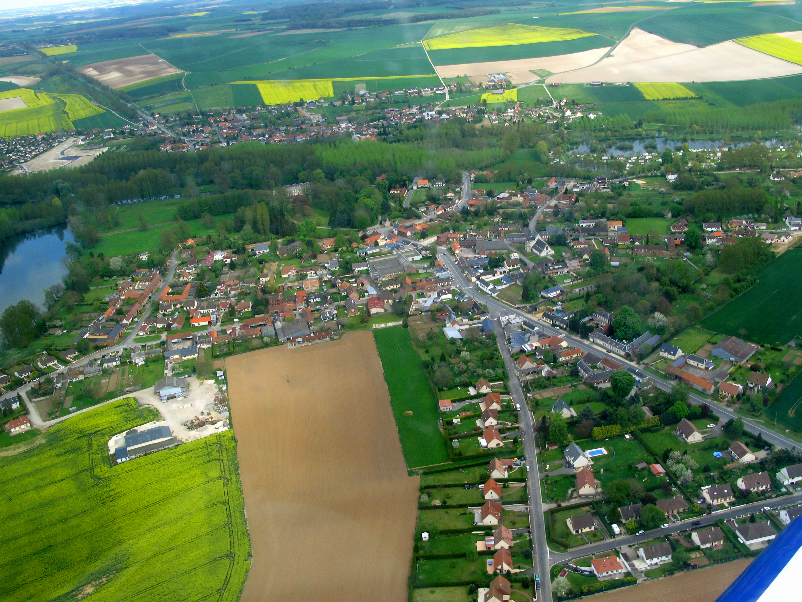 Querrieu (Somme, France) - On voit la jonction de la route D 929 avec le chemin d'Allonville, au centre de l'agglopération. L'église est visible un peu à droite de cette jonction. On peut voir aussi la vallée marécageuse et boisée de l'Hallue qui sépare les villages de Querrieu et de Pont-Noyelles, dont, à gauche de l'image : le grand plan d'eau du marais Madame, ancienne tourbière. Plus au fond, on aperçoit le village voisin de Pont-Noyelles et les collines crayeuses qui le dominent. On remarque : le bord de l'aile de l'avion (dans le coin en bas à droite) (La photo n'est pas parfaite ... quelques reflets du cockpit !)